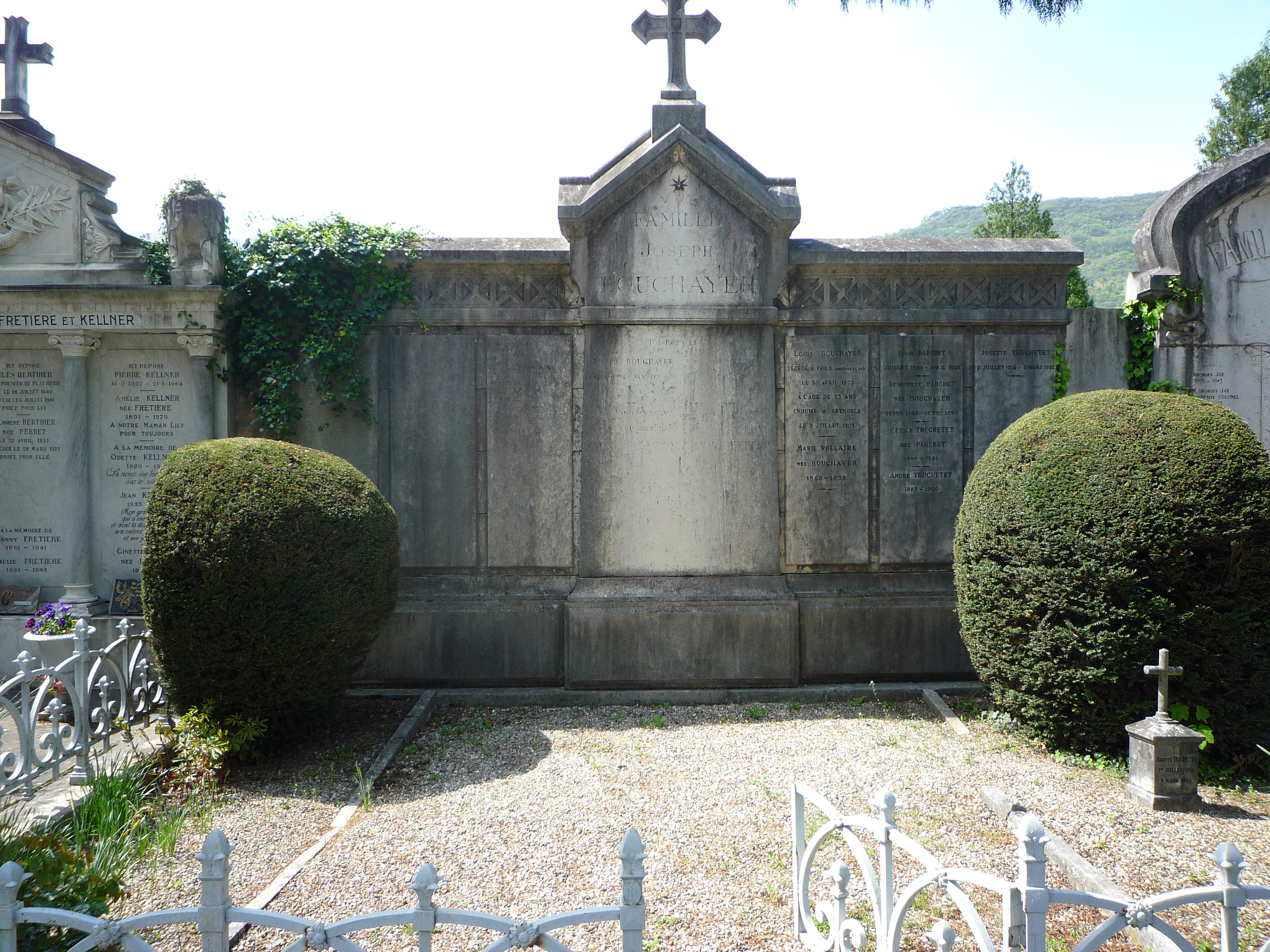 Tombe de Joseph Bouchayer, industriel grenoblois, cimetière Saint-Roch de Grenoble.